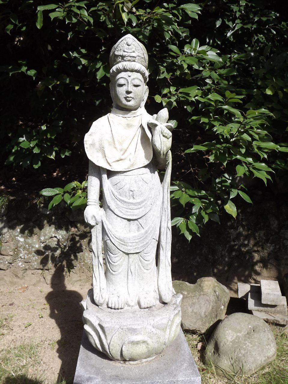 観音寺の観音石像